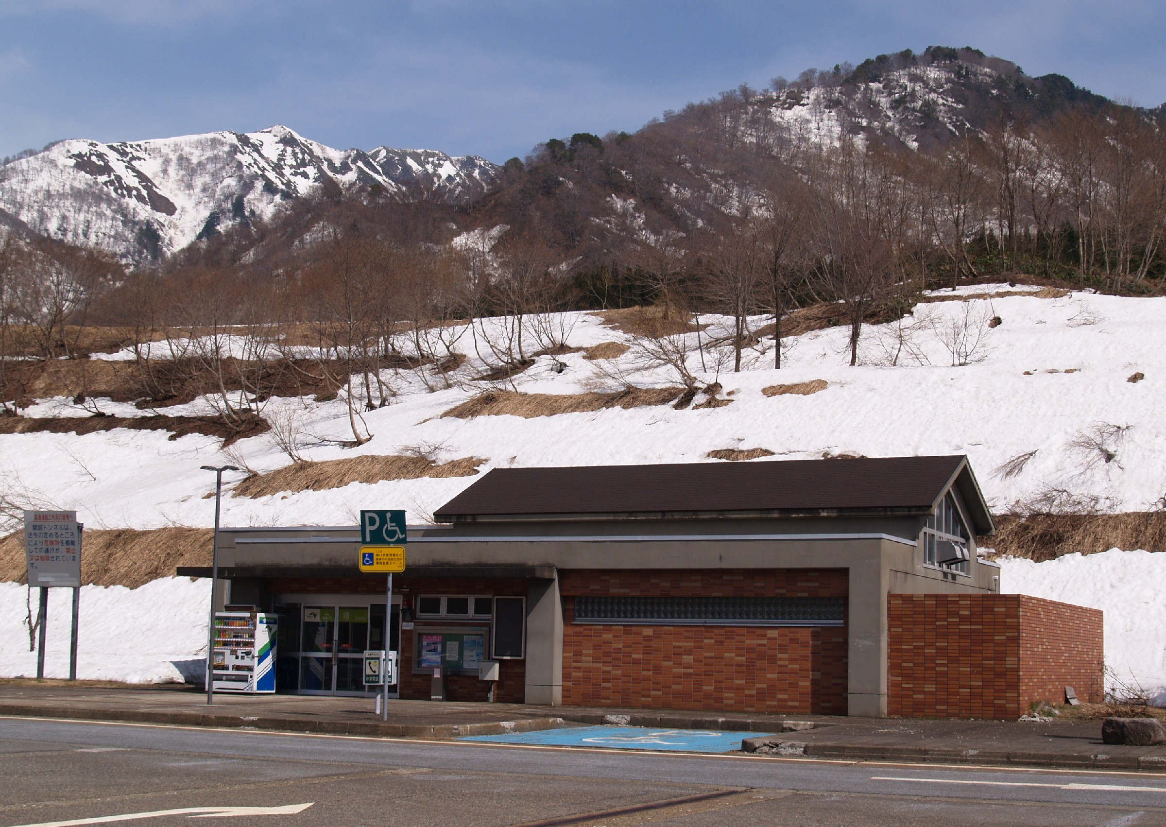 土樽パーキングエリア上り線施設